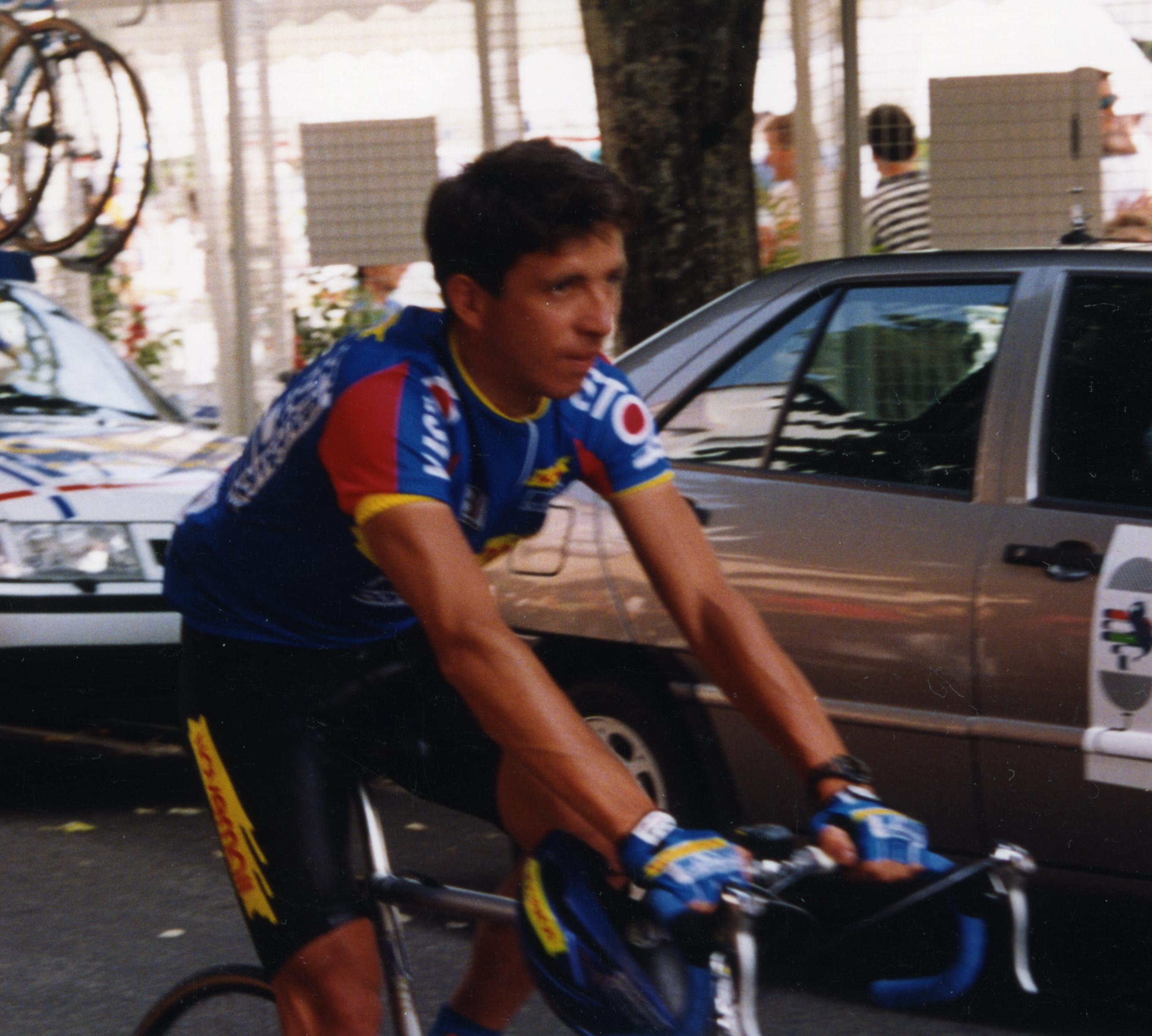 TOUR DE FRANCE 1993